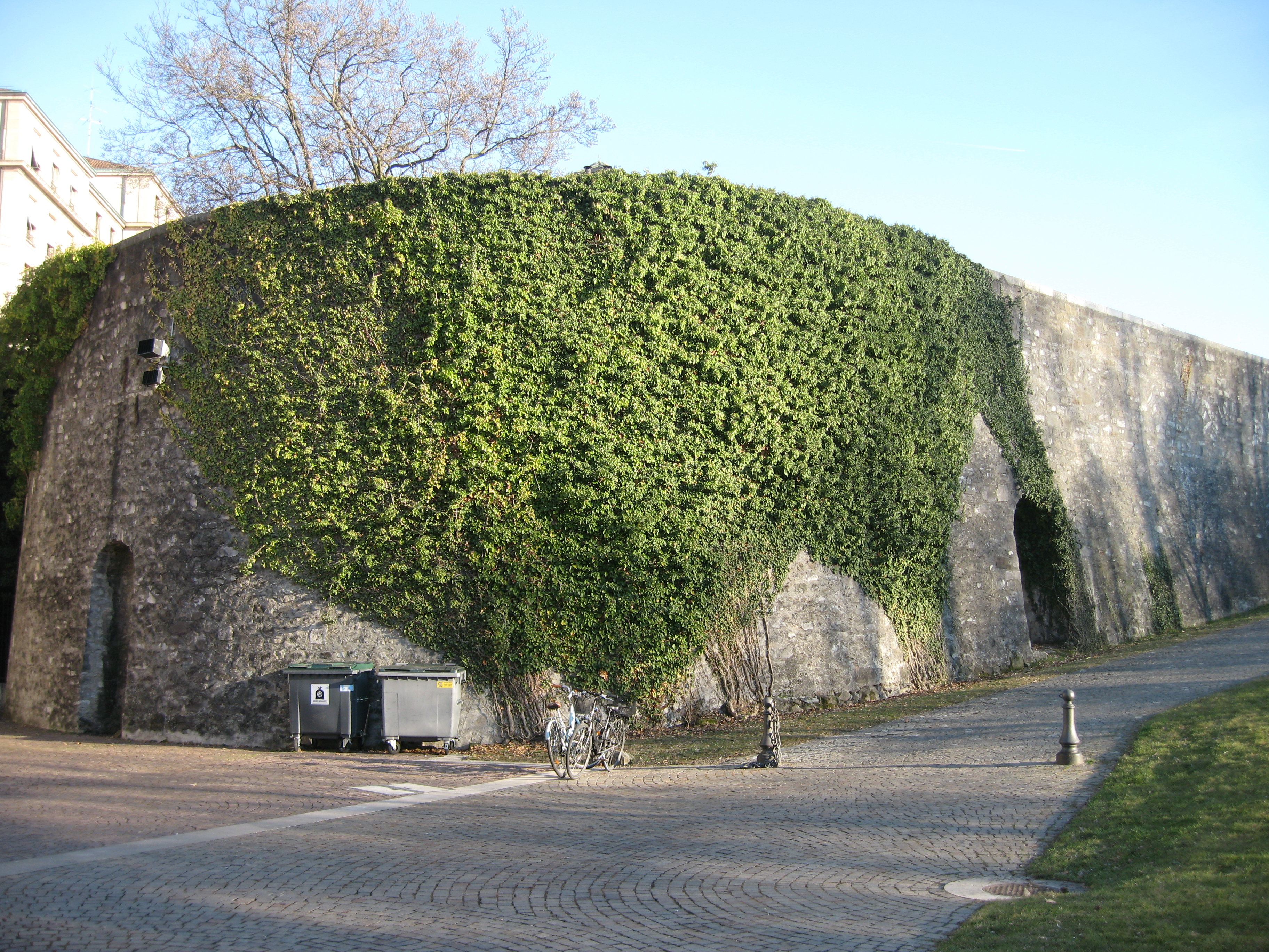 Bastion Saint-Léger, du côté du Parc des Bastions et du Palais Eynard. Il ne reste plus que la moitié du Bastion.